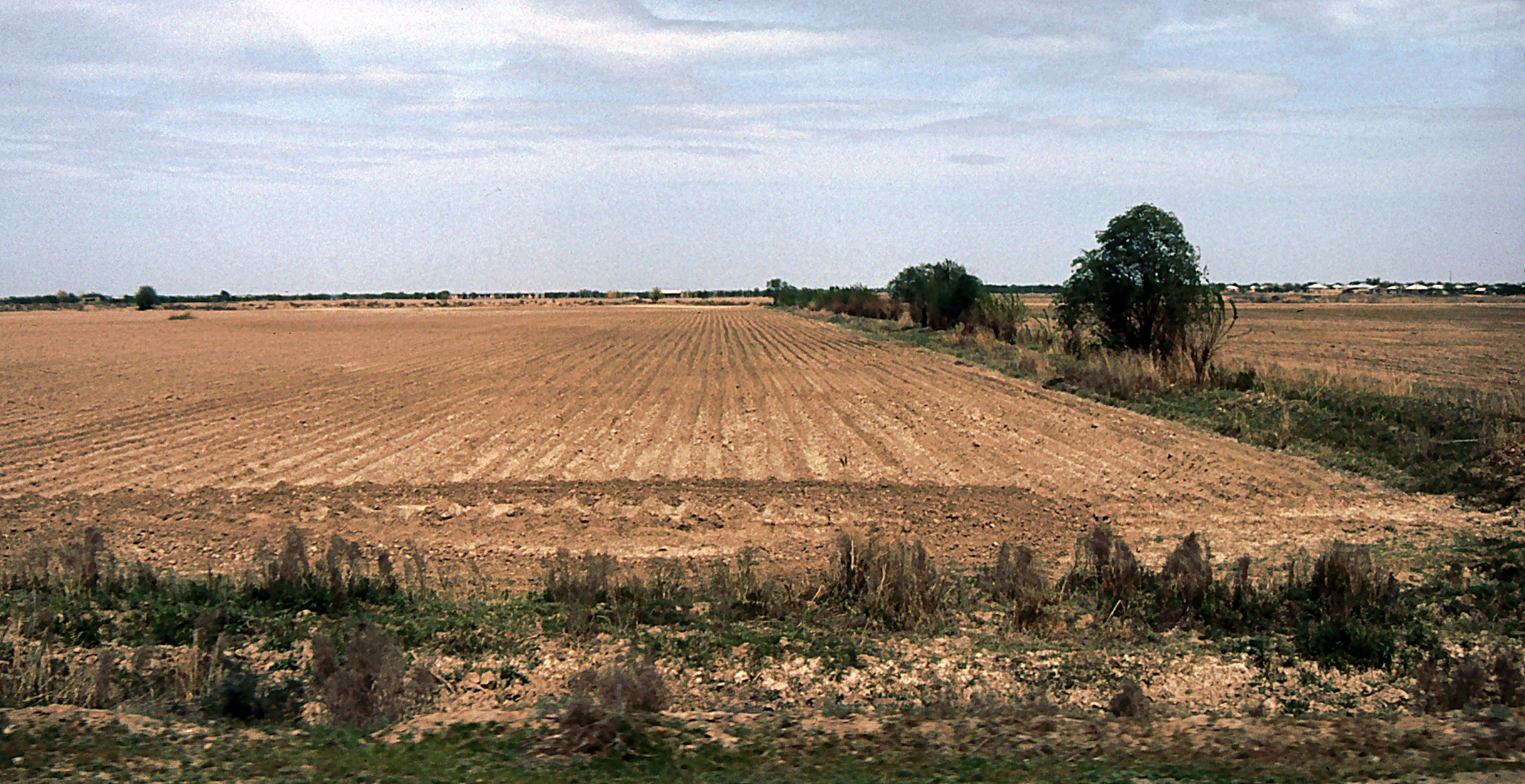 Felder in Usbekistan